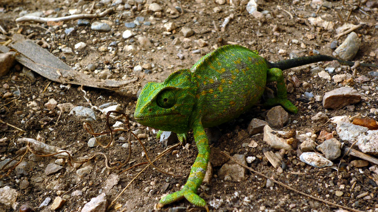 Camaleón común (Chamaeleo chamaeleon) en la rambla de El Portús en Galifa (Cartagena, Spain).